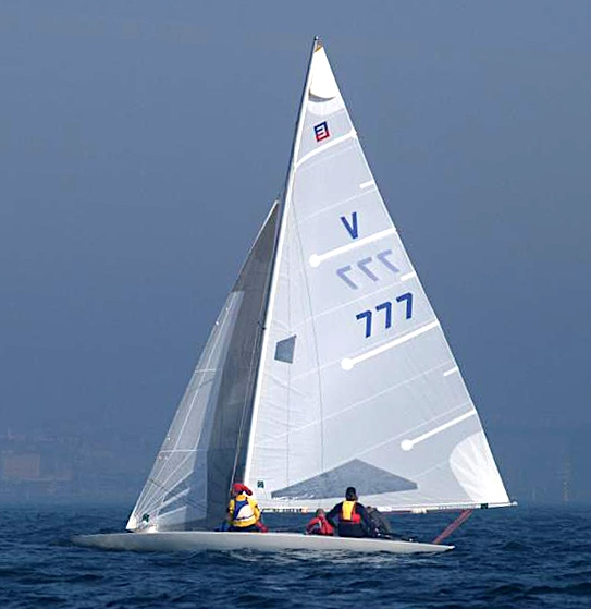 Bildbeschreibung: Segelschnitte Quelle: aus Bild "EScow_SUVLM06_5.jpg" eigenhändig erstellt Autor der Ursprungsversion: Hanninen Markku Datum: 20. Okt. 2006 andere Versionen